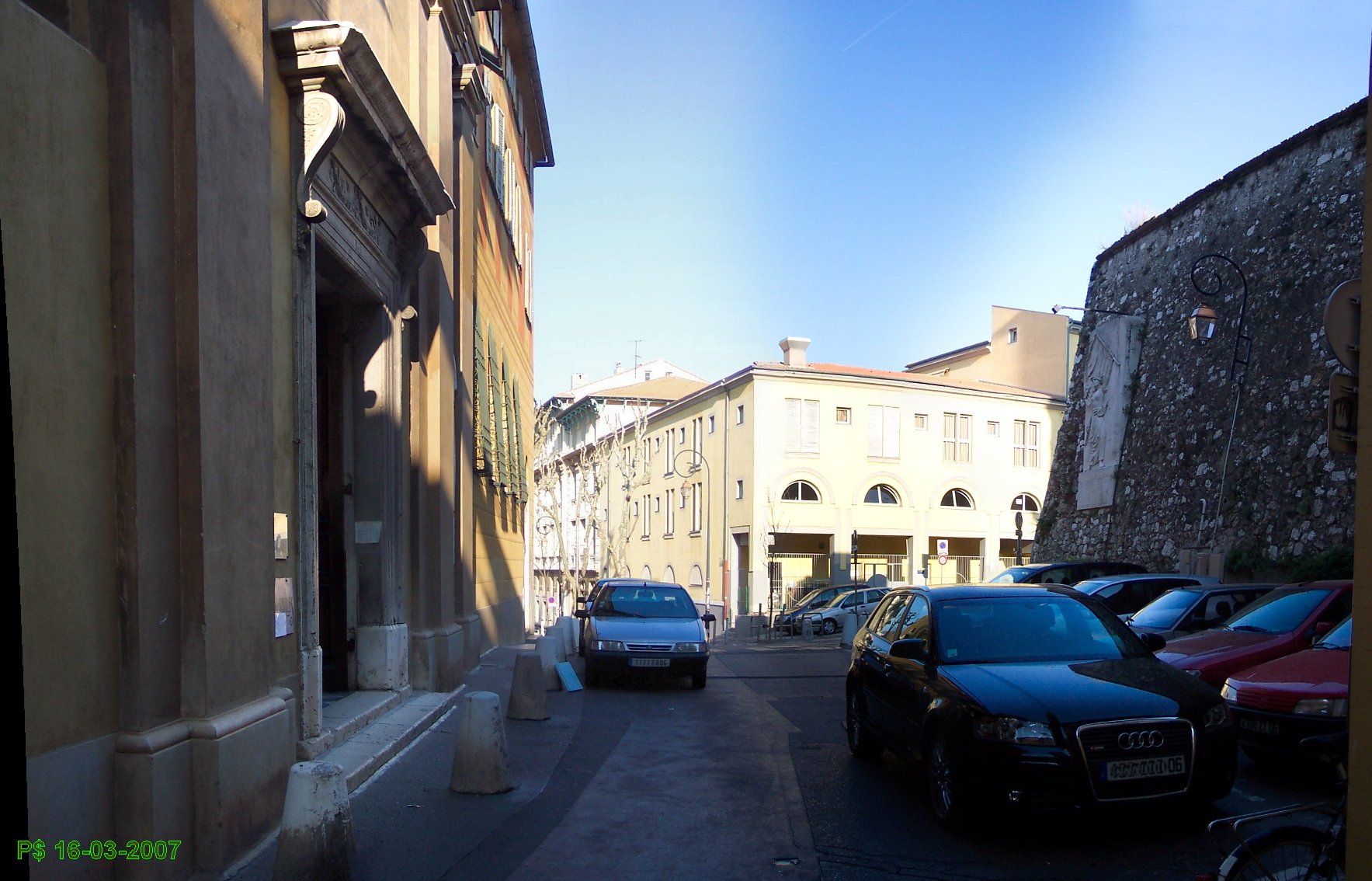 Nice-Vieille ville Eglise St-Jacques et St-Augustin